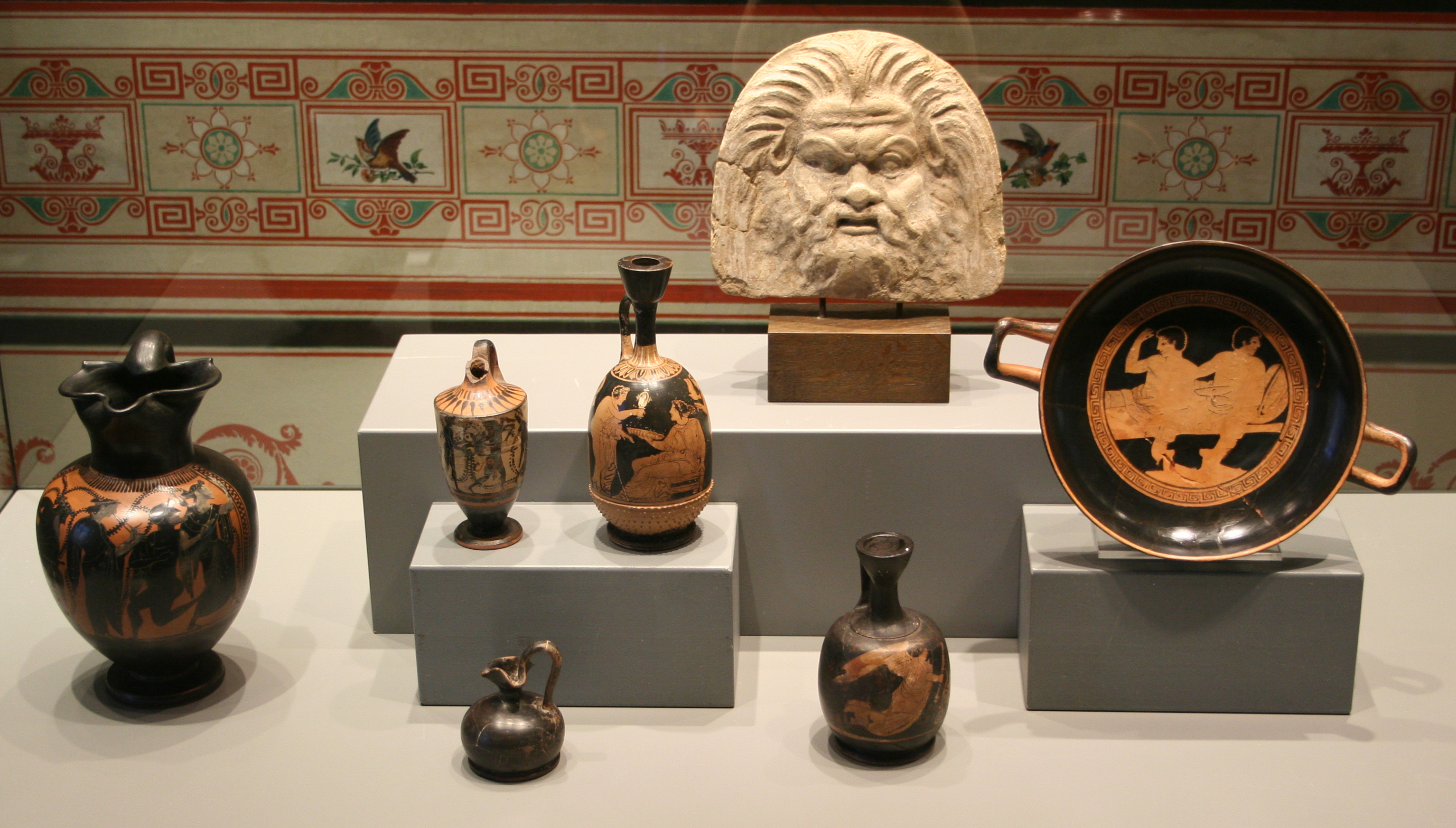 Niedersächsisches Landesmuseum für Kunst und Kulturgeschichte, Oldenburg